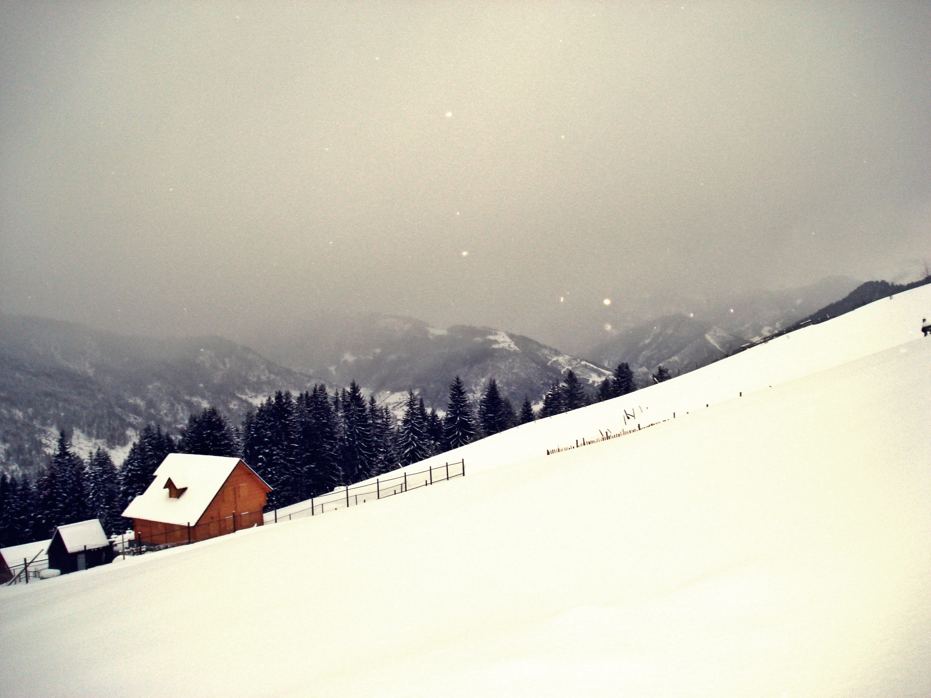 Kuqishta, ne janar.